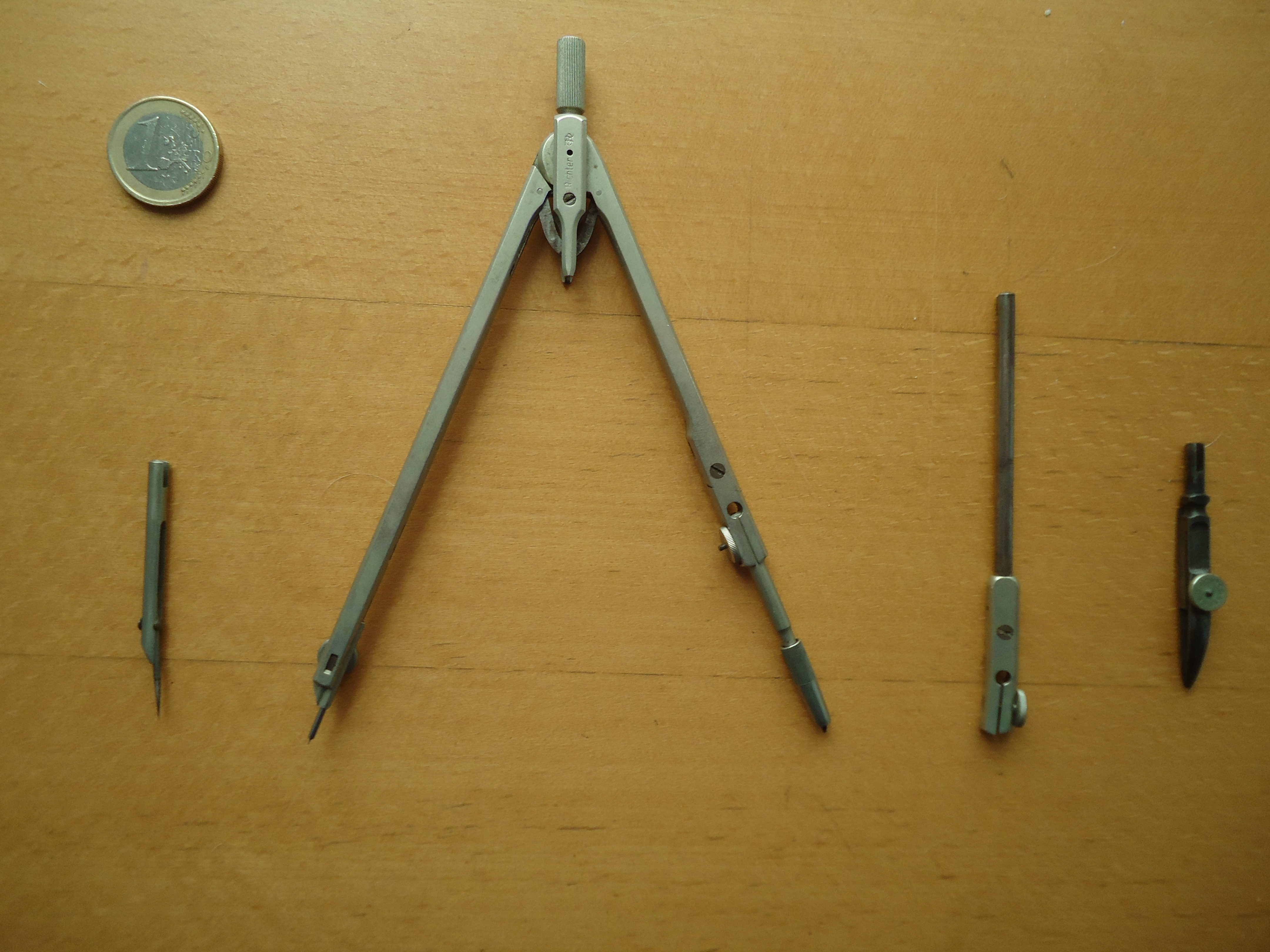 Caja de compases (E.O. Richter&Co). Compás y sus utensilios